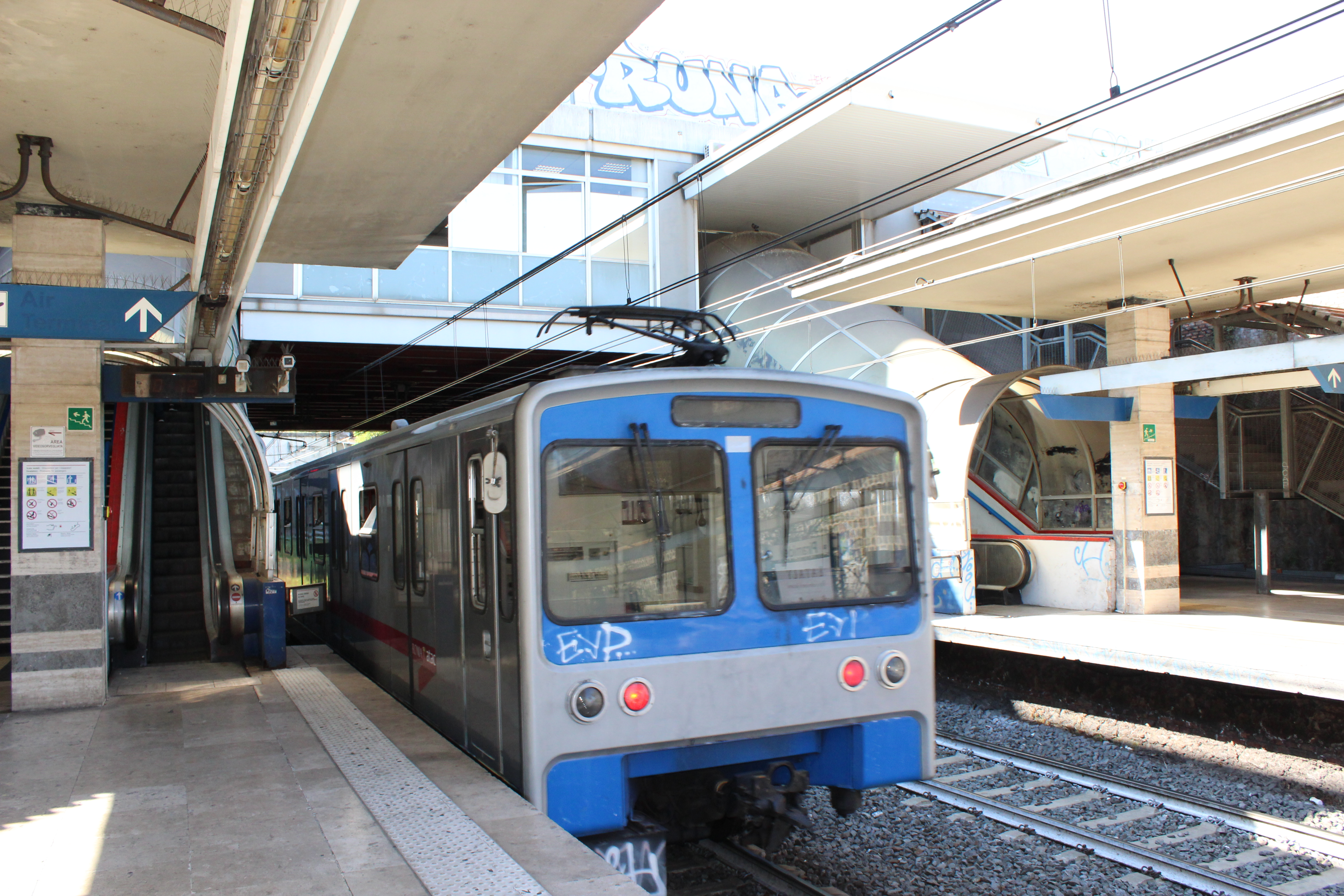 Una elettromotrice gruppo MB 100 dell'Atac di Roma, in livrea grigia con fascia rosso amaranto, in partenza dalla fermata di Piramide. Notare il nuovo gancio di tipo BSI, simile a quelli già in uso sui convogli CAF, in sostituzione del classico Scharfenberg